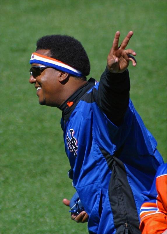 Pedro Martinez waves goodbye after signing some autographs